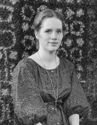 Liv Ullmann i 1966.